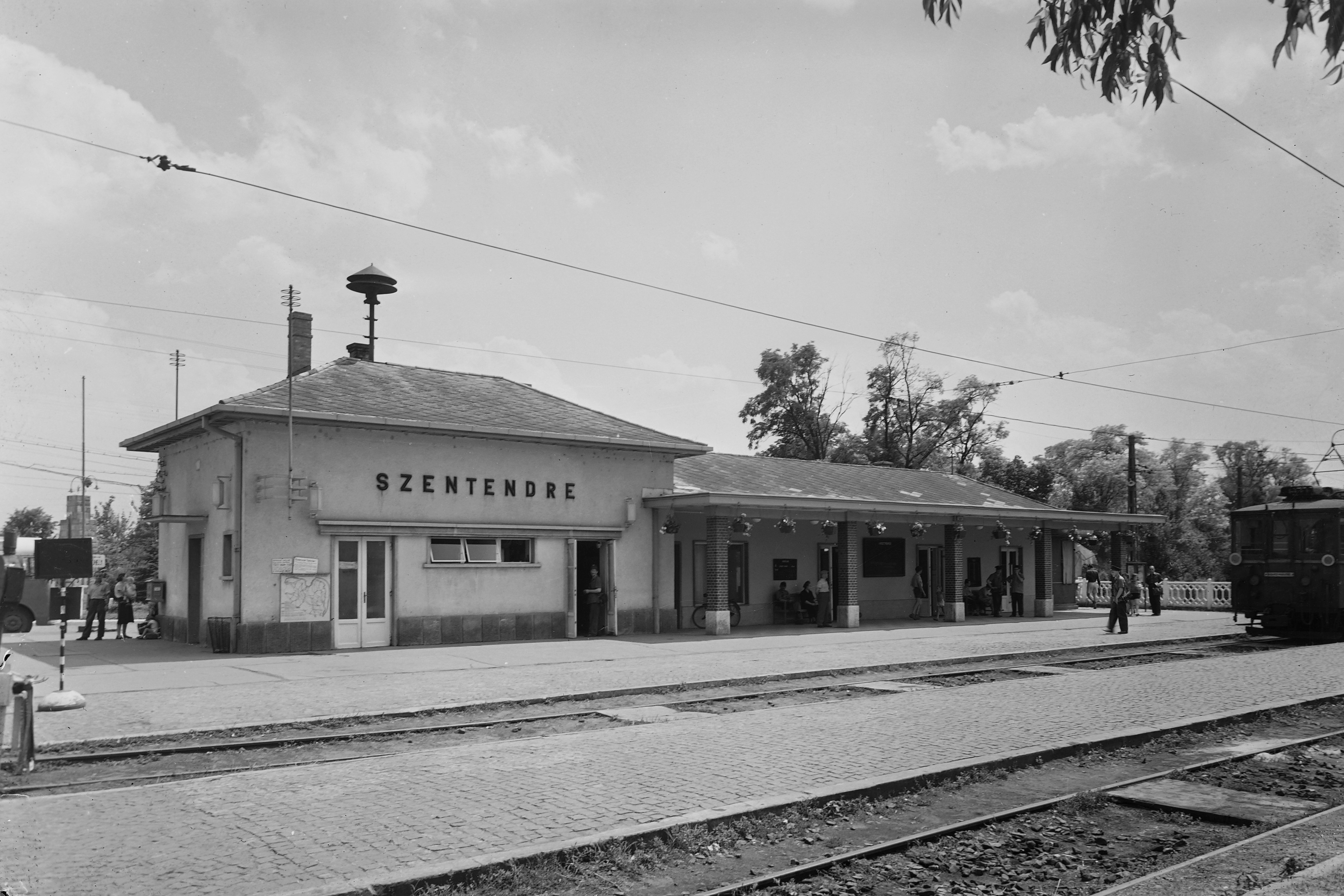 HÉV végállomás. Location: Hungary, Szentendre Tags: railway, commuter train, siren Title: HÉV végállomás.